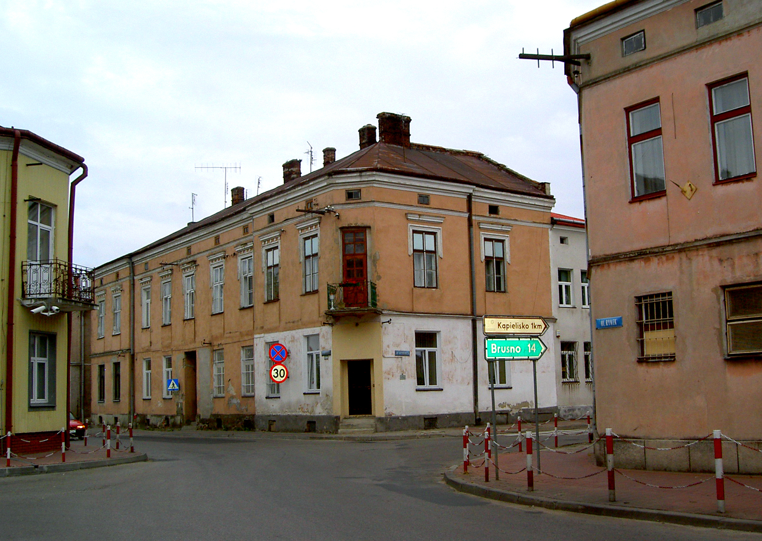 Cieszanów, Centrum• Cieszanów, Poland - Town centre